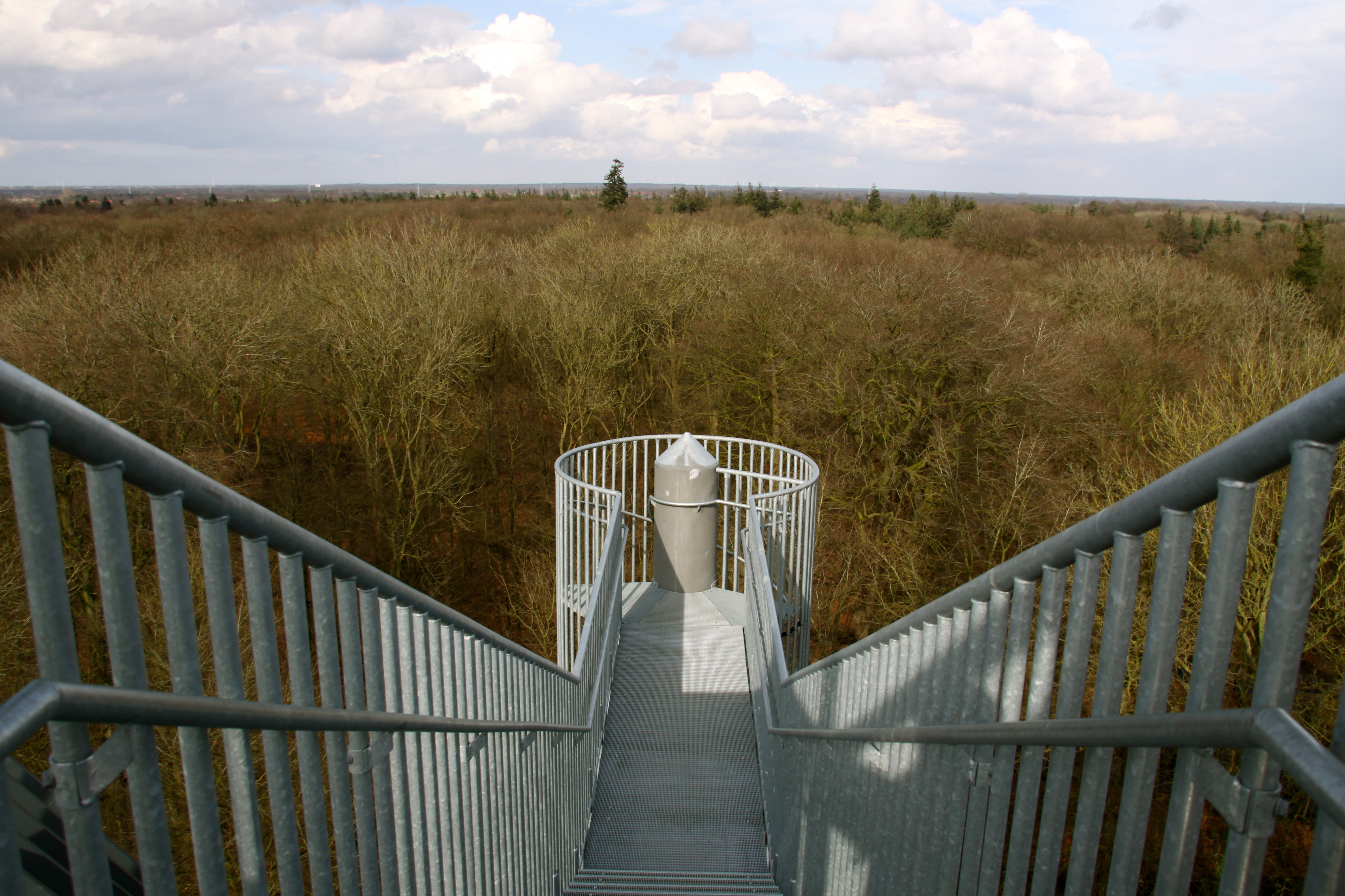 Aussicht Kloster Ihlow